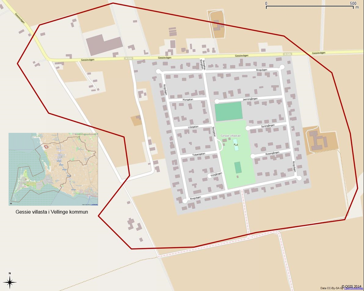 Tätorten Gessie villastads gränser 1990 enligt Atlas över rikets indelningar 1992.